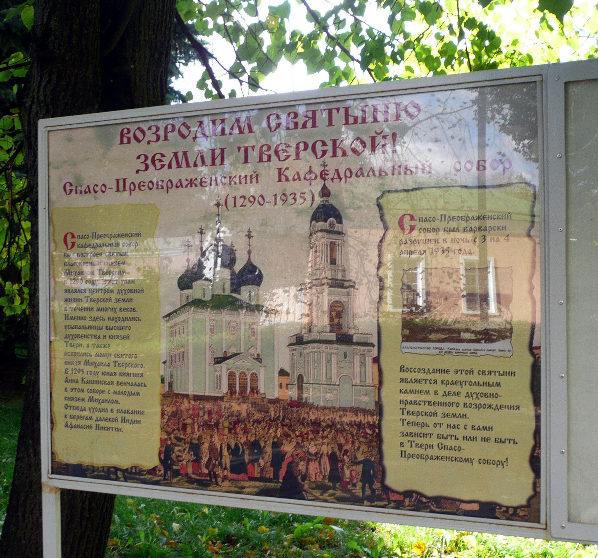 Стенд на месте Спасо-Преображенского собора в Твери